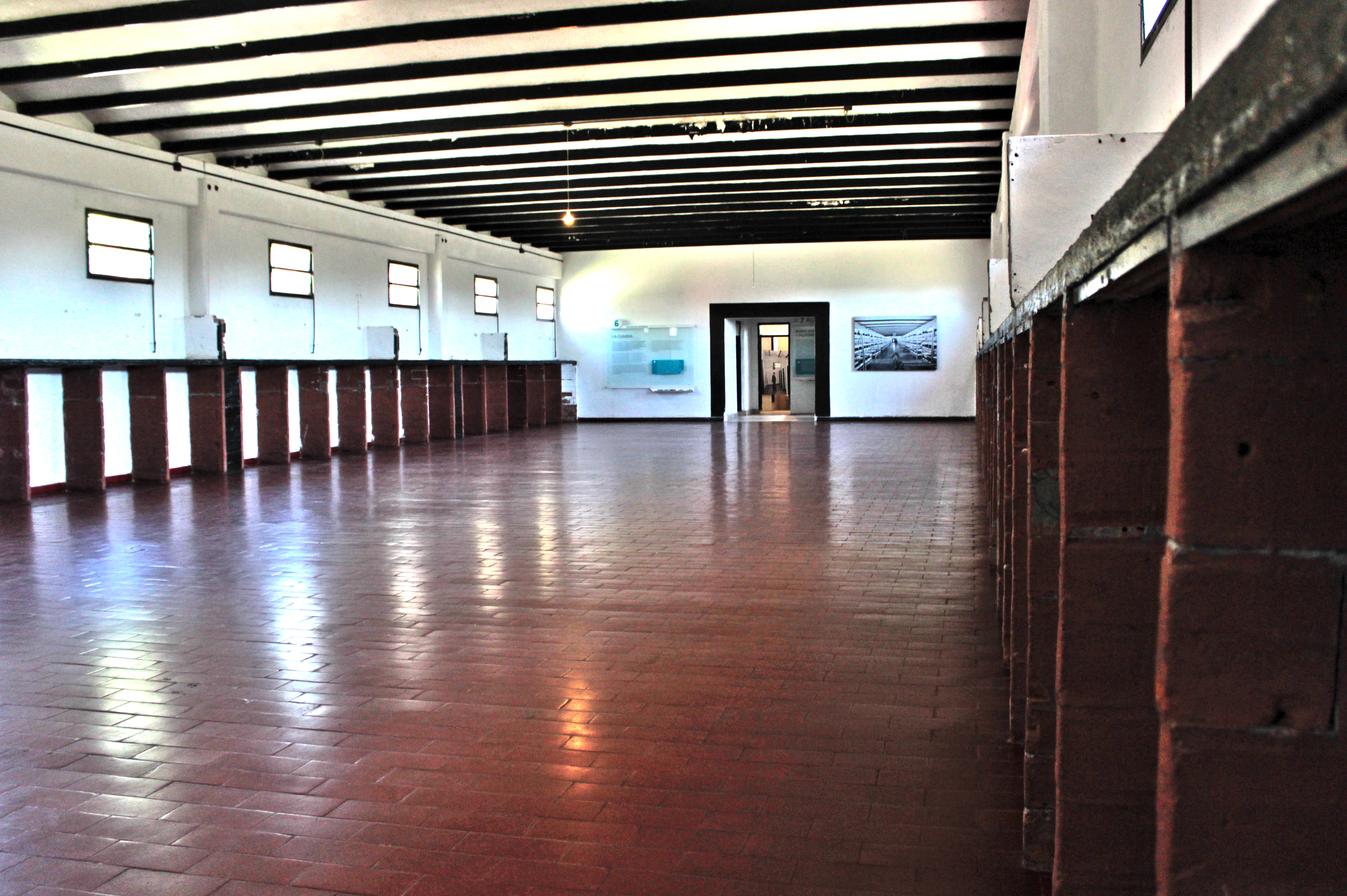 "La cuadra", donde los detenidos pasaban la mayor parte de su cautiverio en el Espacio Para La Memoria La Perla